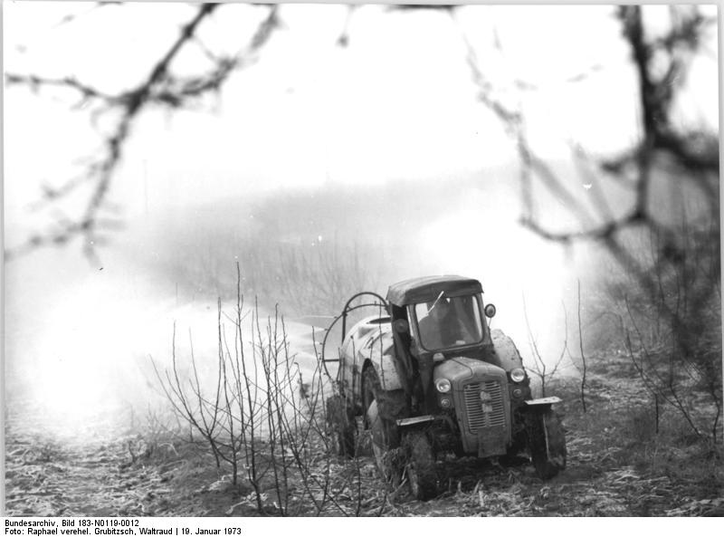 LPG Dürrweitzschen, Schädlingsbekämpfung ADN-ZB Raphael 19.1.1973 Bez. Leipzig: Pflege für Obstbestände.- Das Besprühen der jungen Apfelbäume mit einer Schädlingsbekämpfungsemulsion ist eine wesentliche Voraussetzung, daß die Apfelernte auch im Jahr 1973 wieder gut wird. Die Gärtner der Produktionsgenossenschaft "Erwin Baur" in Dürrweitzschen, Kreis Grimma, versenden in den Wintermonaten wöchentlich 30 Tonnen Obst an die Verbraucher in den Bezirken Karl-Marx-Stadt und Leipzig. In diesem Jahr wollen sie 1200 Tonnen Äpfel ernten. (vergl. N 0119-11N)